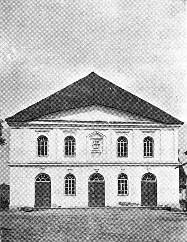 Беларуская (тарашкевіца): Столін (Stolin), Вялікая сынагога (Vialikaja synagoga)